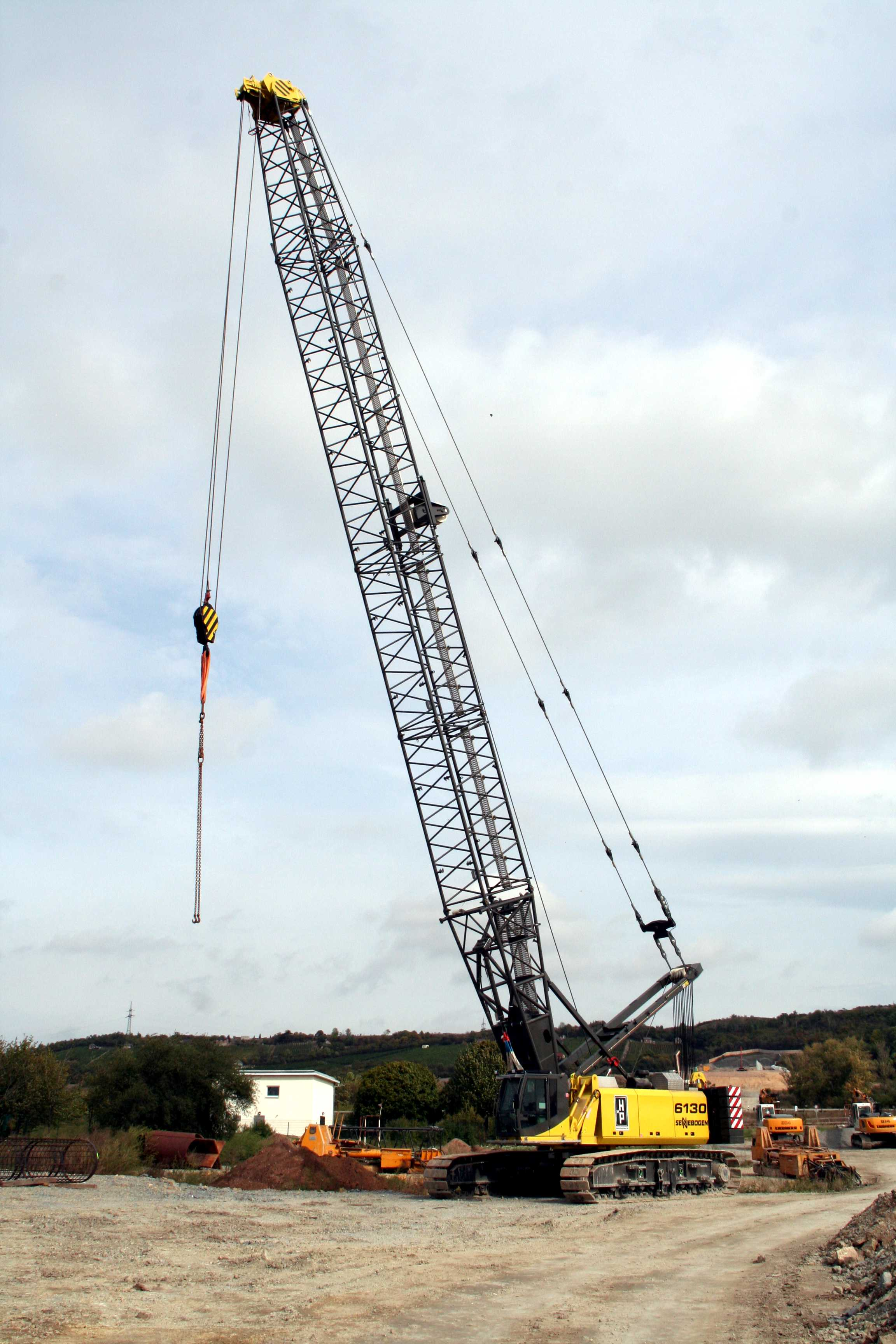 Seilbagger Sennebogen 6130